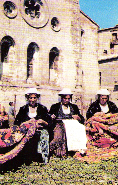 San Giovanni in Fiore - pacchiane cartolina anni '70